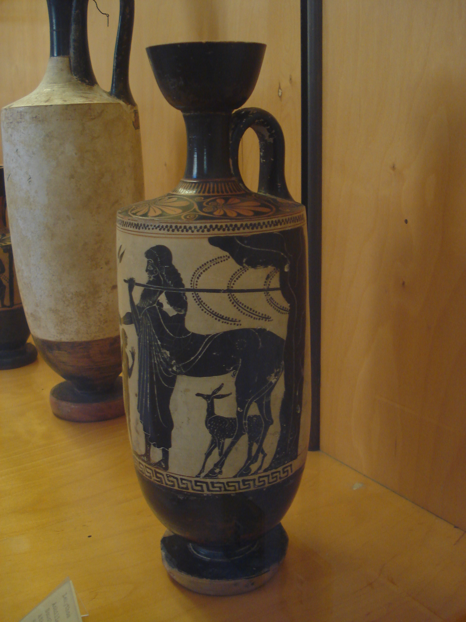 Scuola del "Pittore di Athena": Lekythos a sfondo bianco con il centauro Chirone, ca. 500 a.C. Museo archeologico regionale di Palermo, 28 settembre 2006. Foto di Giovanni Dall'Orto.